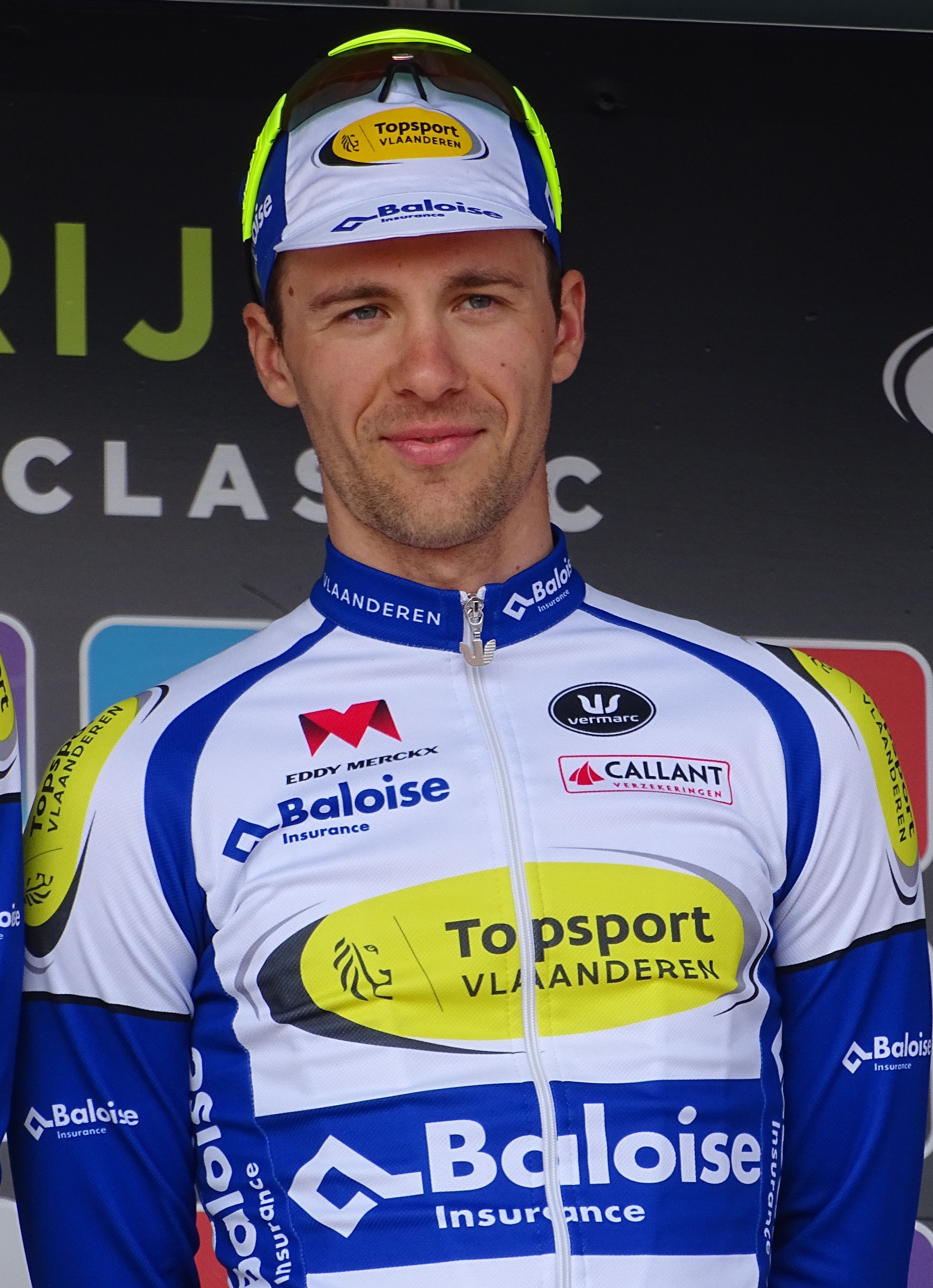 Reportage réalisé le mercredi 8 avril à l'occasion du départ du Grand Prix de l'Escaut 2015 à Anvers, Belgique.